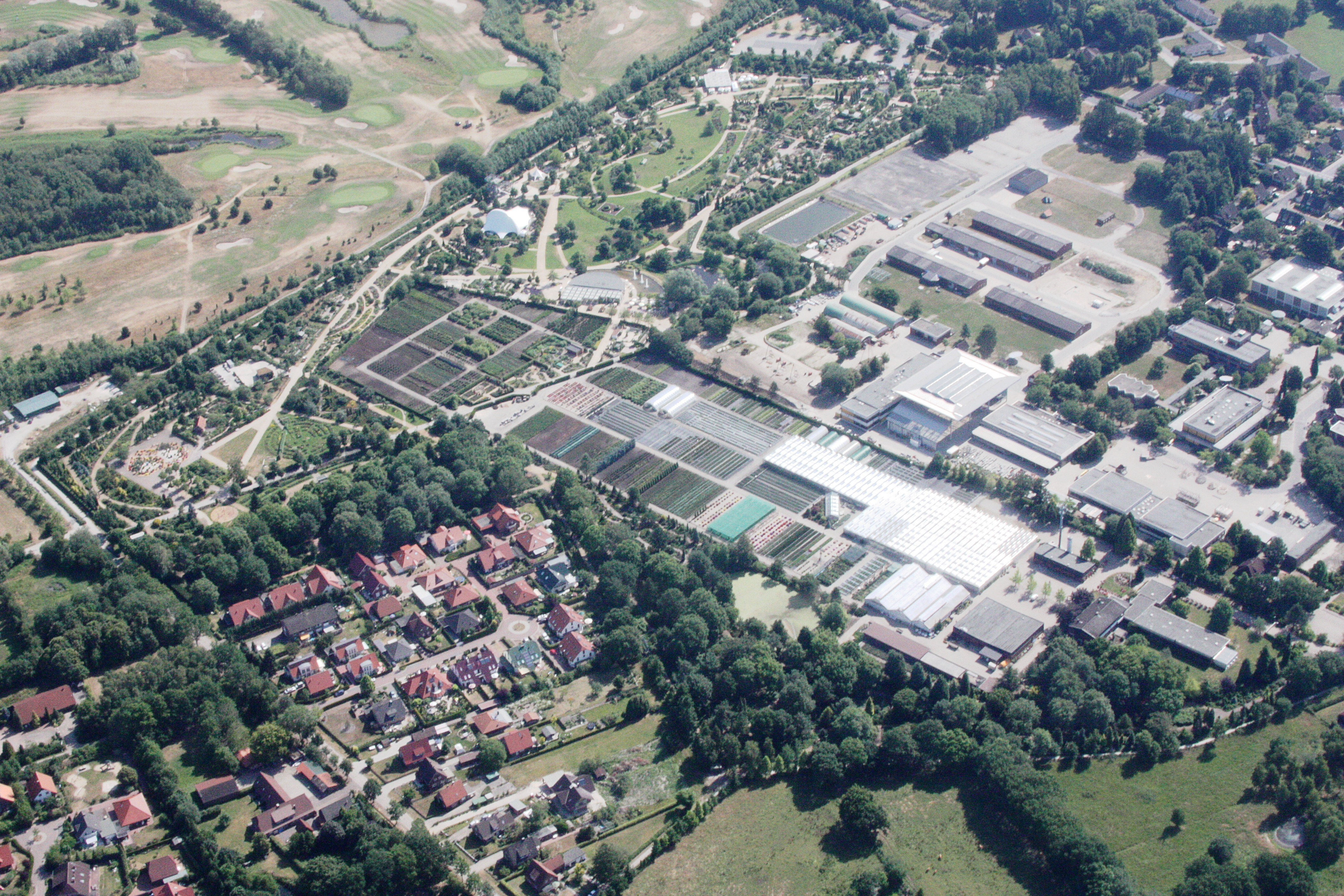 Flug von Oldenburg (Oldenburg) nach Bad Zwischenahn und zur Landesgartenschau ; Flughöhe 1500 ft; Juli 2010; Originalfoto bearbeitet: Tonwertkorrektur und Bild geschärft mit Hochpassfilter